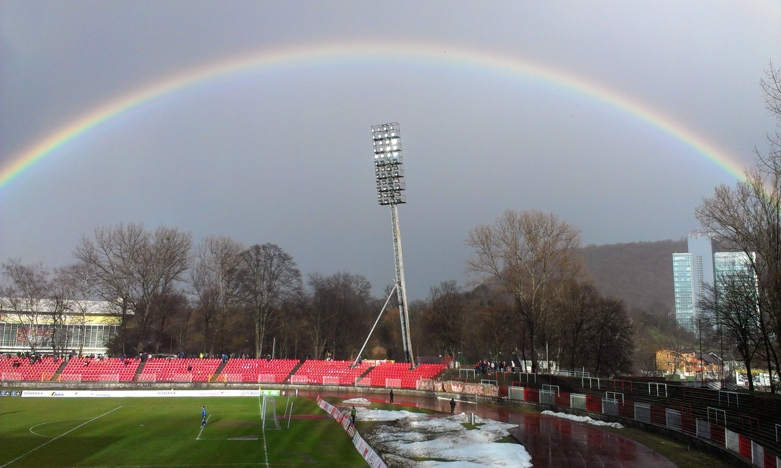 Banská Bystrica 13..4.2013